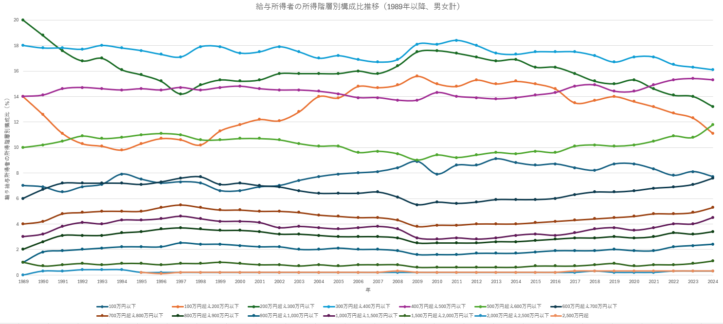 1989年以降の給与所得者の所得階層別構成比推移